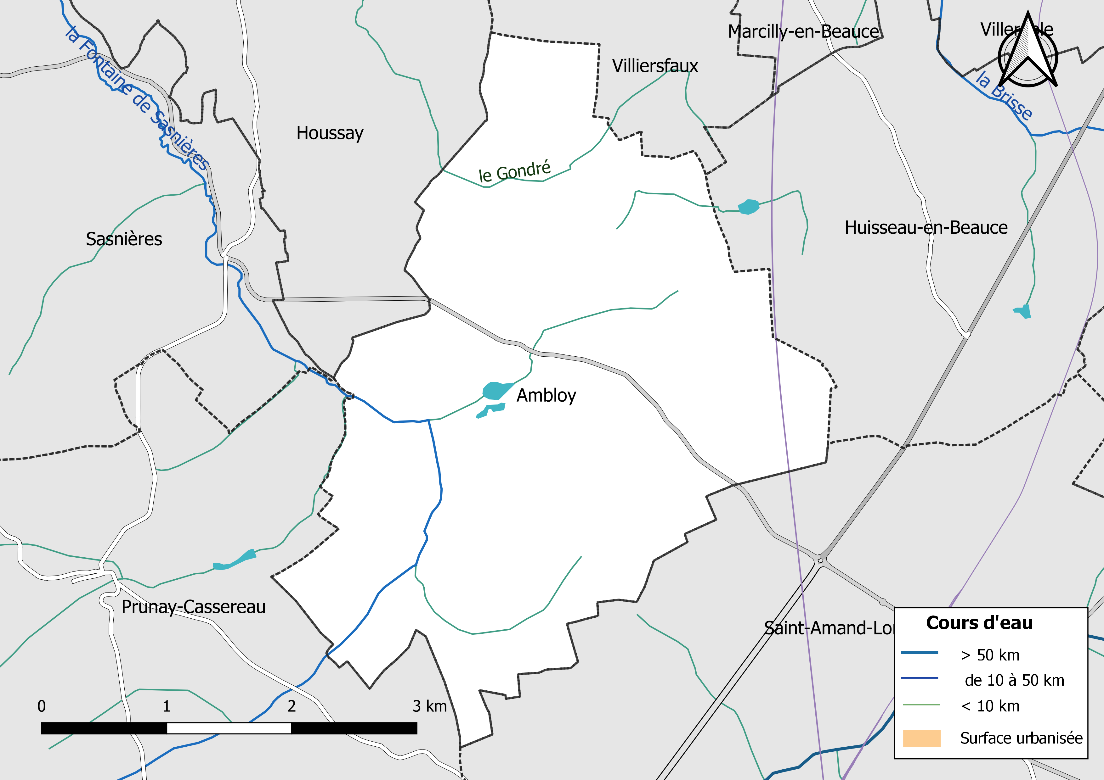 Carte du réseau hydrographique de la commune d'Ambloy (France).